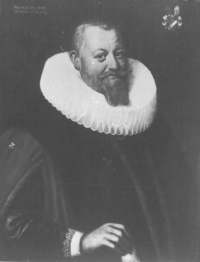 Johann Oeckhoven, Bürgermeister von Köln, 1634 / 1637